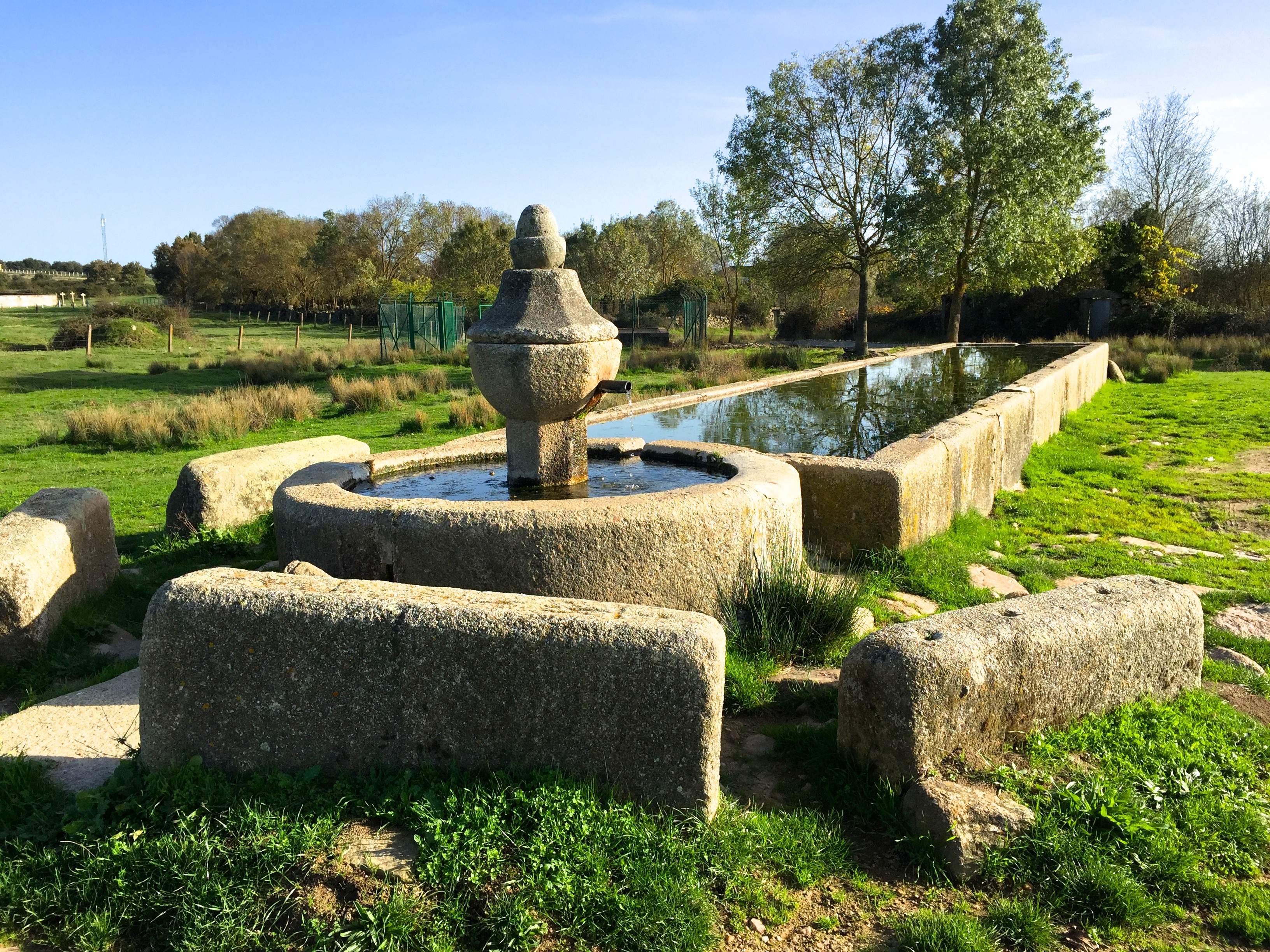 Caño en las eras